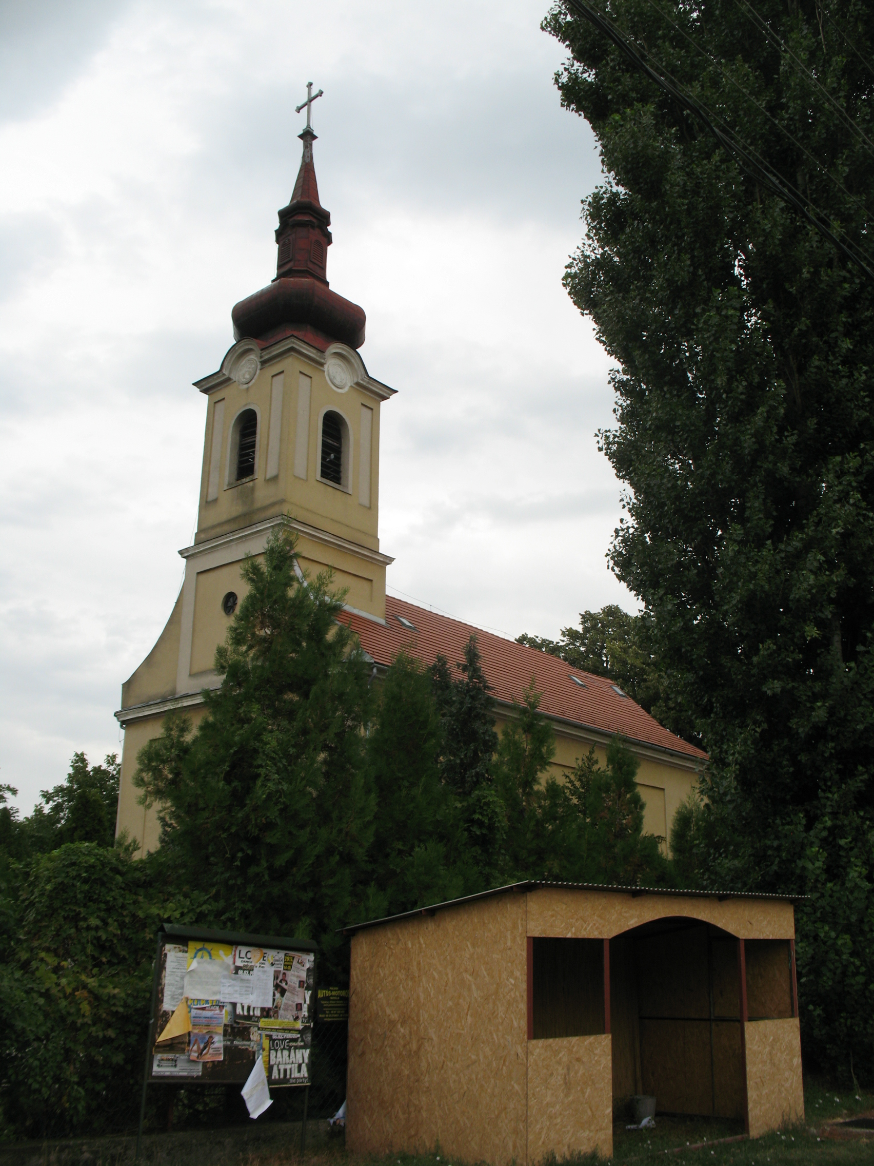 Nemesgulács